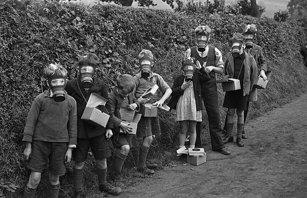 Teitl Cymraeg/Welsh title: Faciwis yn Sir Drefaldwyn Ffotograffydd/Photographer: Geoff Charles (1909-2002) Dyddiad/Date: September 9, 1939. Cyfrwng/Medium: Negydd / Negative Cyfeiriad/Reference: (gcc00891) Rhif cofnod / Record no.: 3472111 Rhagor o wybodaeth am gasgliad Geoff Charles yn Llyfrgell Genedlaethol Cymru Ceir mwy o ffotograffau o Gymru a'r Gororau adeg yr Ail Ryfel Byd ar wefan .uk More information about the Geoff Charles Collection at the National Library of Wales More photographs of Wales and the English border during the Second World War can be found at .uk